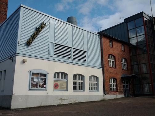 Lasten ja nuorten kulttuuritalo Vernissa